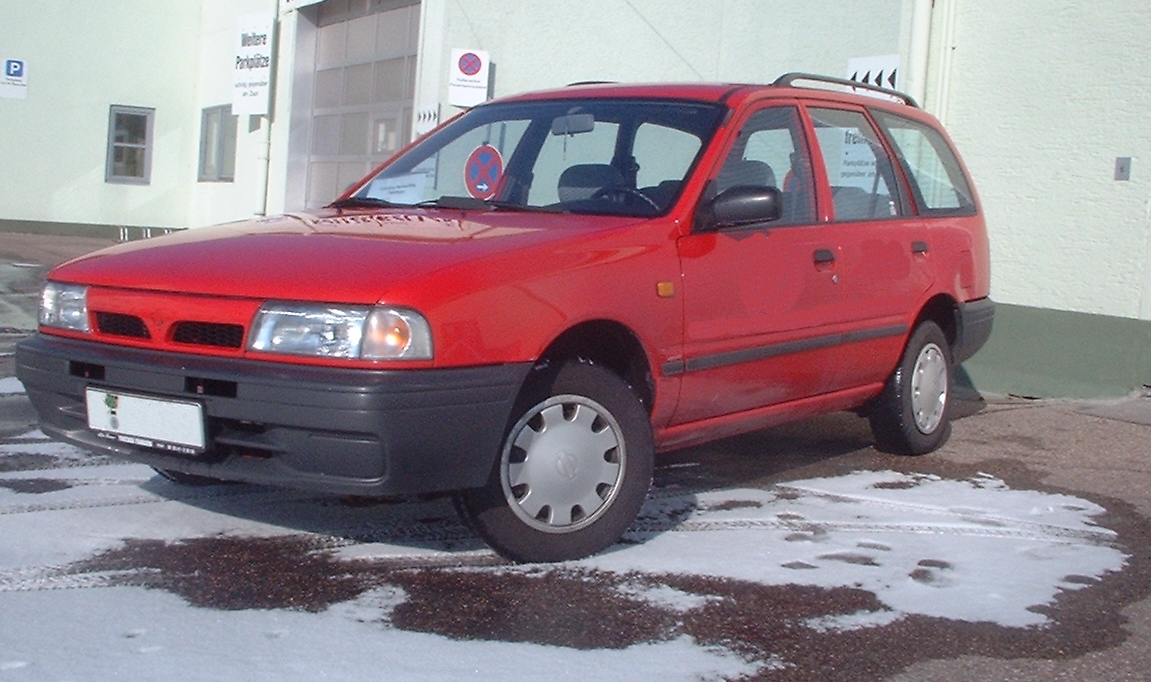 Nissan Sunny N14 Traveller 2.0DLX